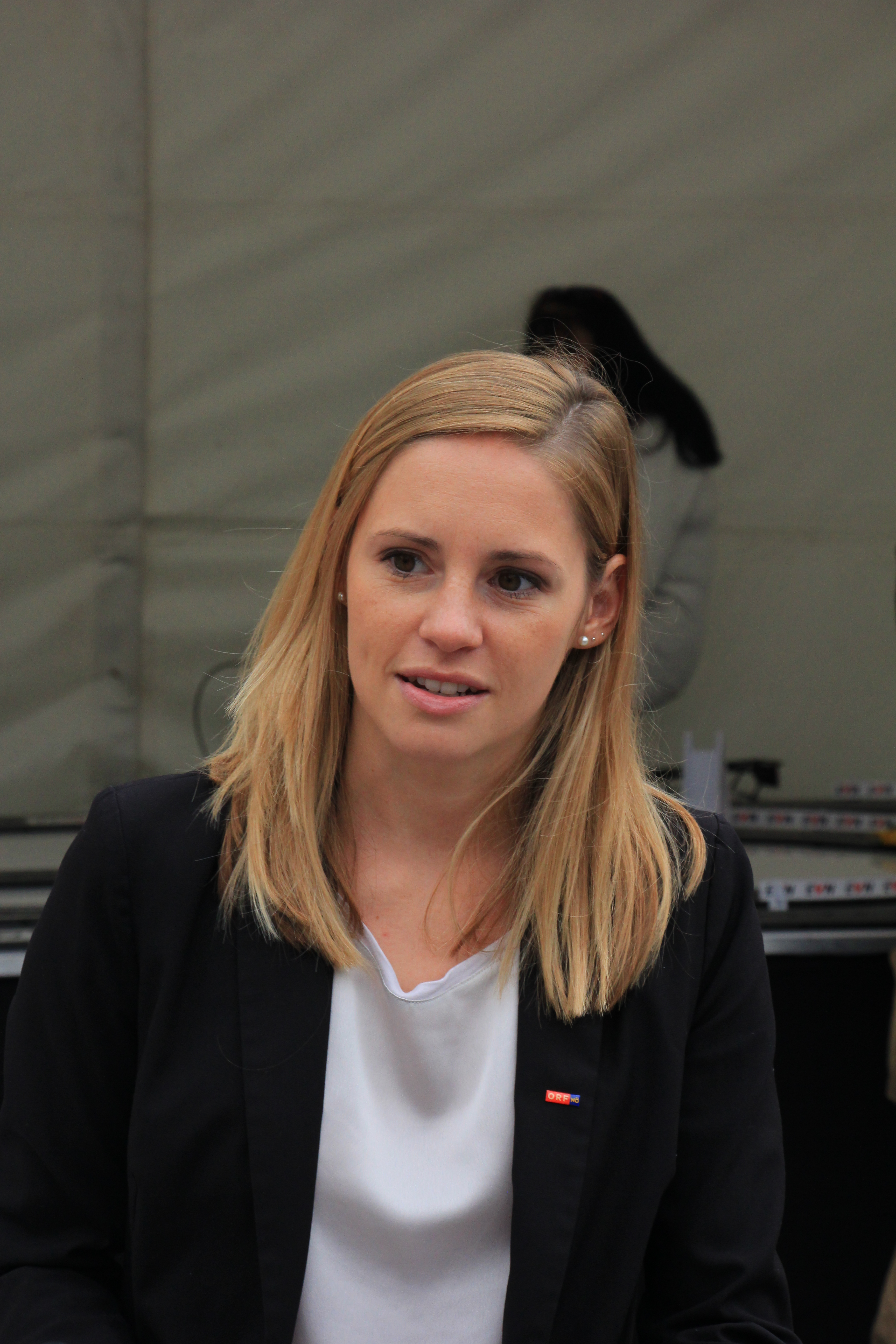 Schnappschüsse von Moderatoren am Tag der offenen Tür beim 50-Jahr-Jubiläum des ORF-Niederösterreich